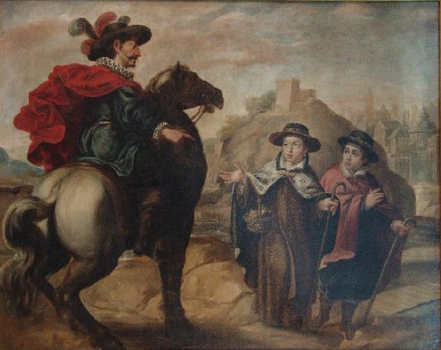 La obra representa a la mística española Santa Teresa de Jesús (1515-1582) buscando el martirio junto con su hermano durante su infancia.